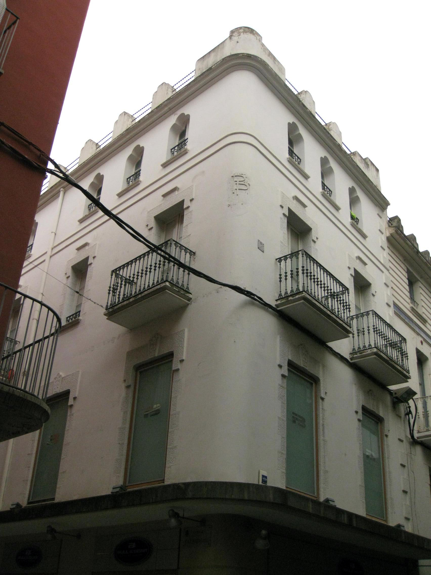 Casa Puig i Paris (Figueres)